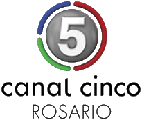 logo de Canal Cinco